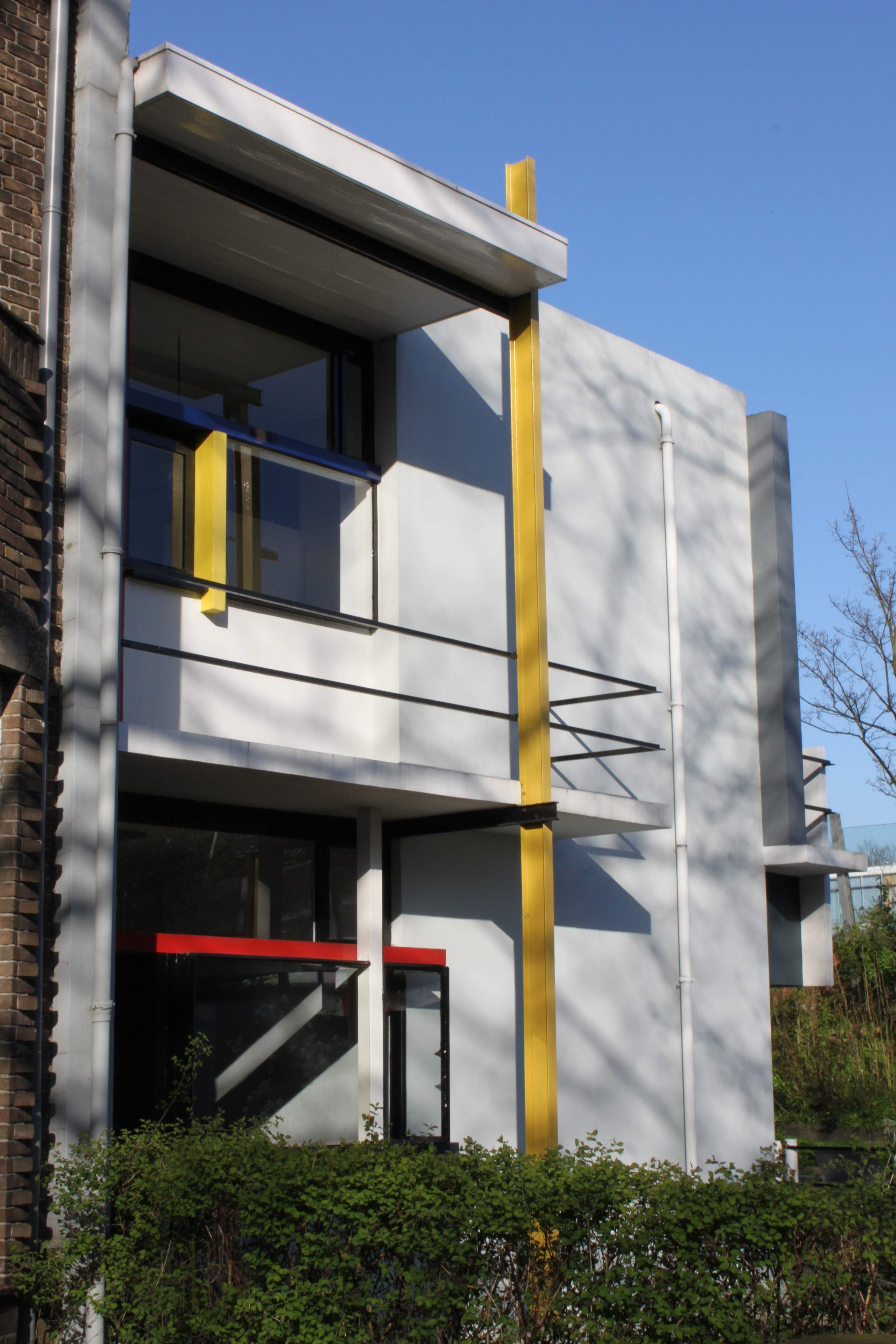 Het Rietveld-Schröderhuis in Utrecht